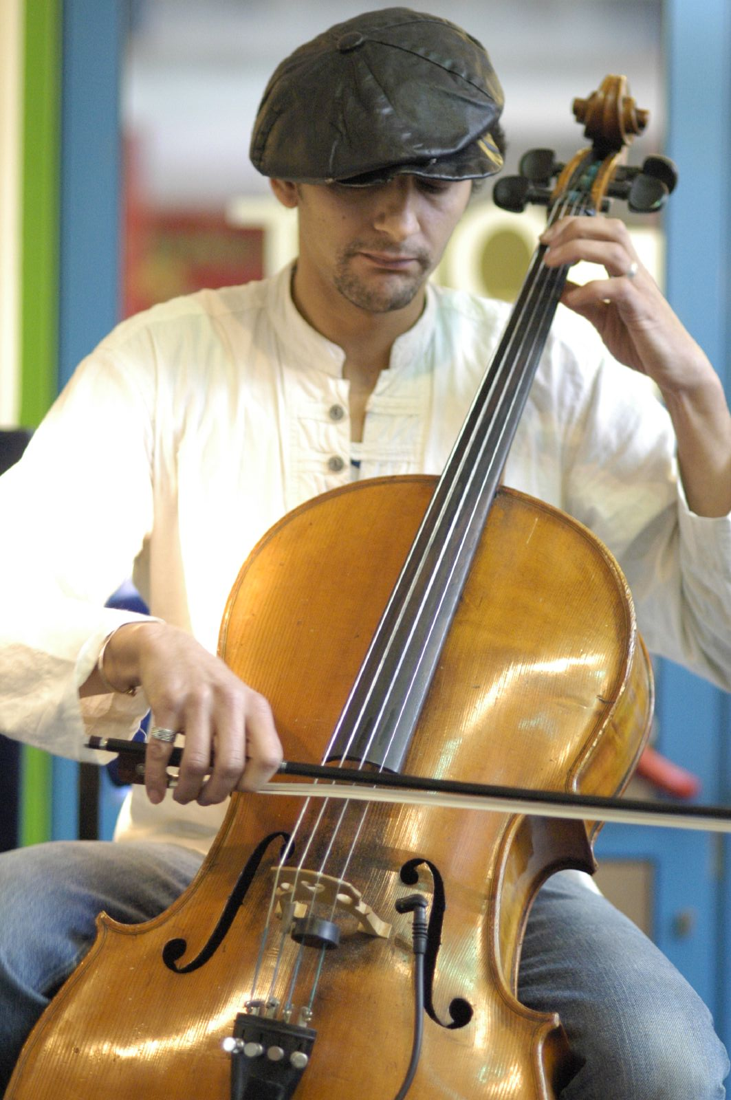 Ivan "Celloman" Hussey